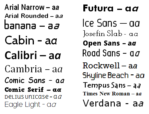 Verschillende bekende en minder bekende lettertypes met de romein- en cursief-a.